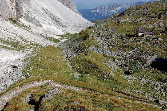 Seitenmoränen